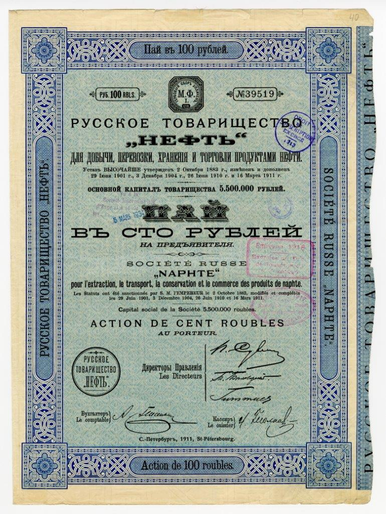 Пай в 100 руб. на предъявителя "Русского товарищества "Нефть" для добычи, перевозки, хранения и торговли продуктами нефти" с основным капиталом в 5,5 млн. руб. С.-Петербург, 1911 г.